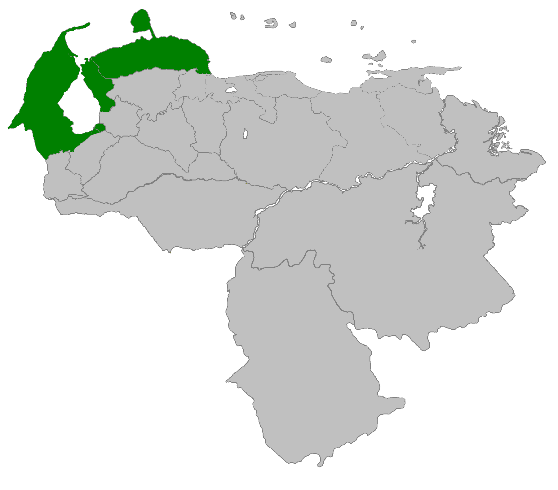 Estado Falcón - Zulia